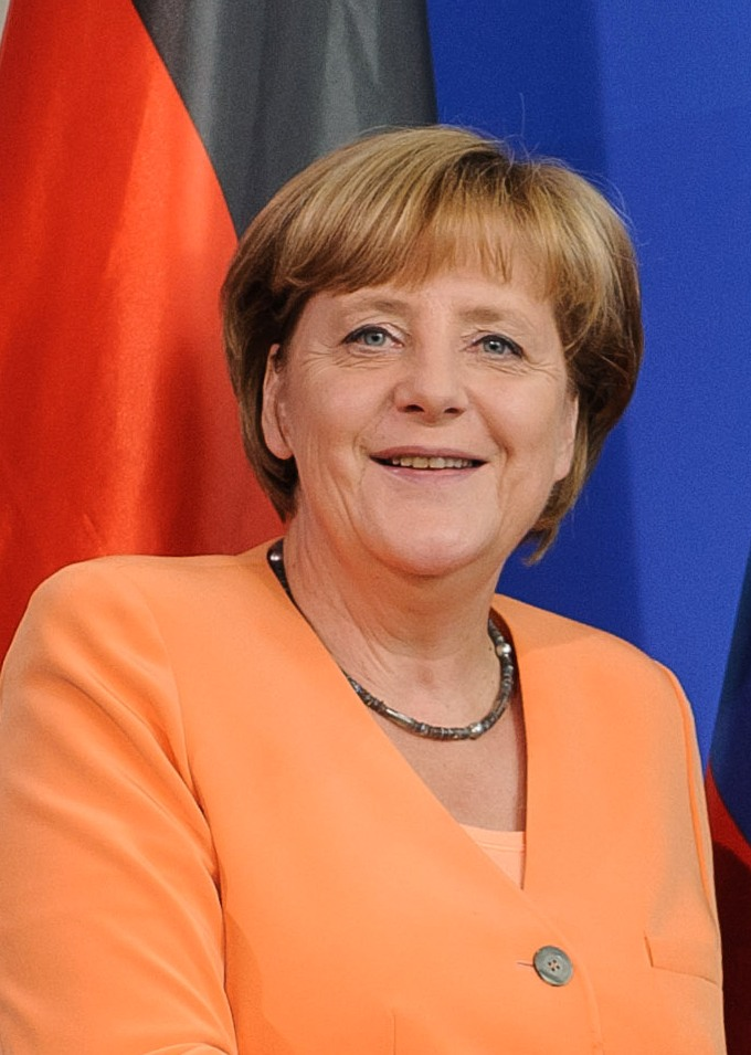 Angela Merkel, 2013